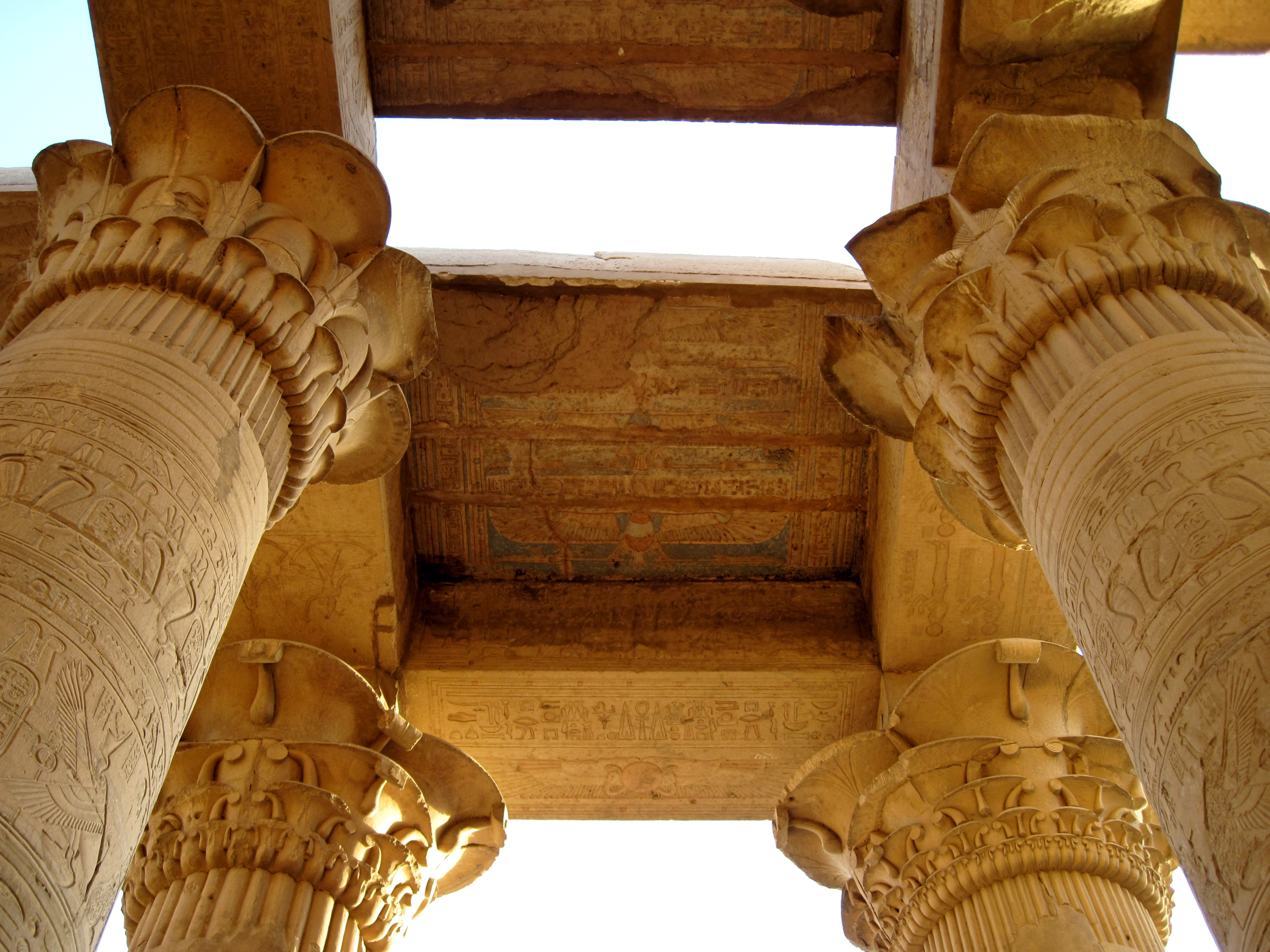 Tempel von Kom Ombo, Ägypten